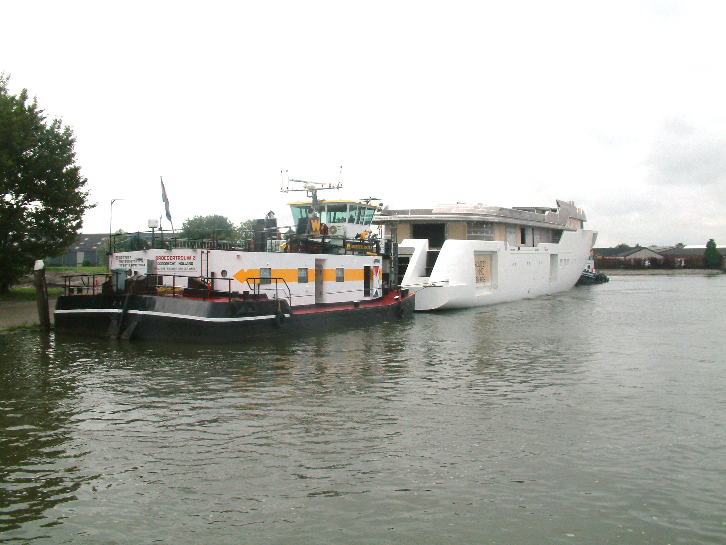 De BROEDERTROUW II brengt de Hampshire II naar de afbouw.